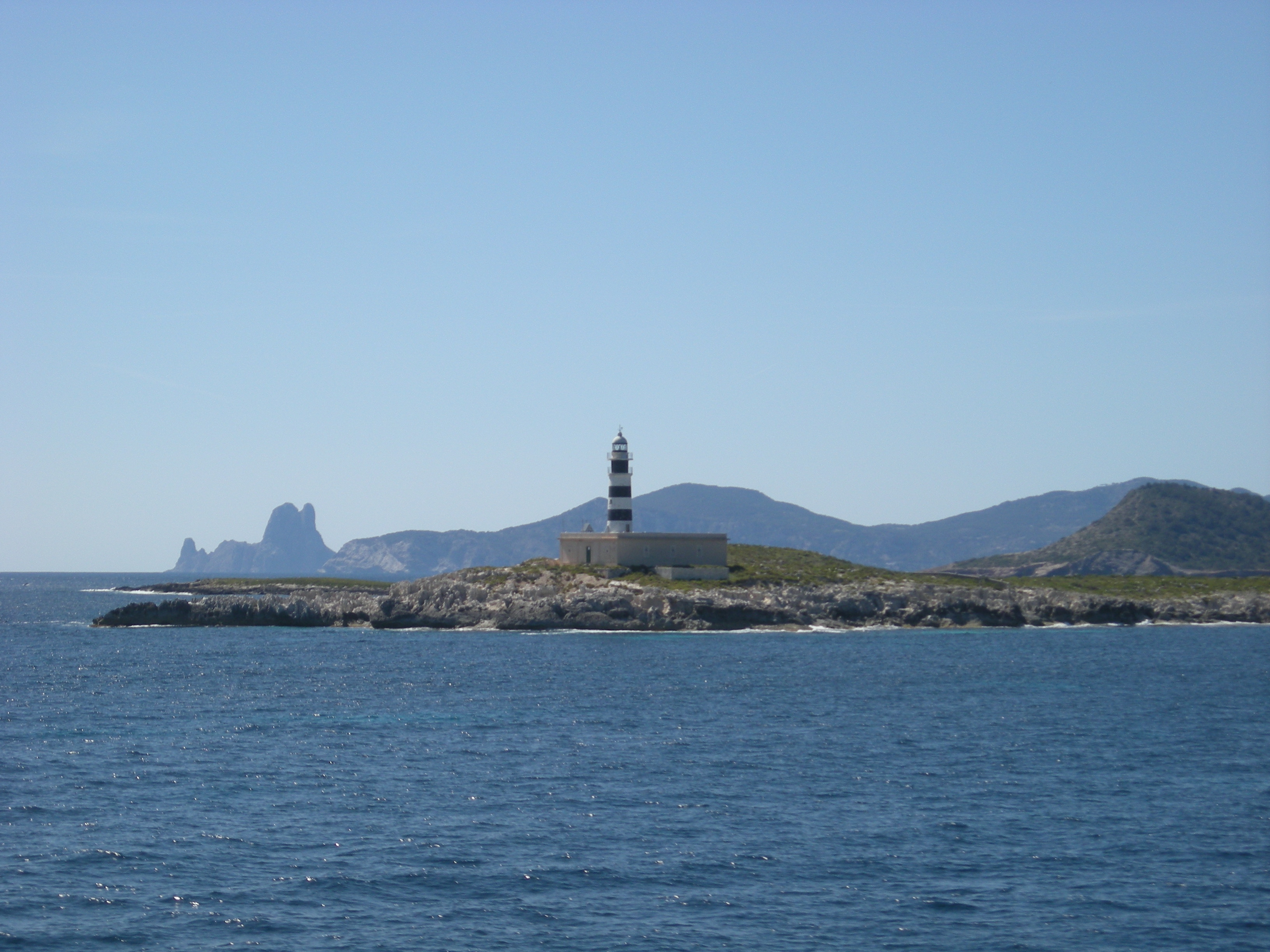 Far Eivissa